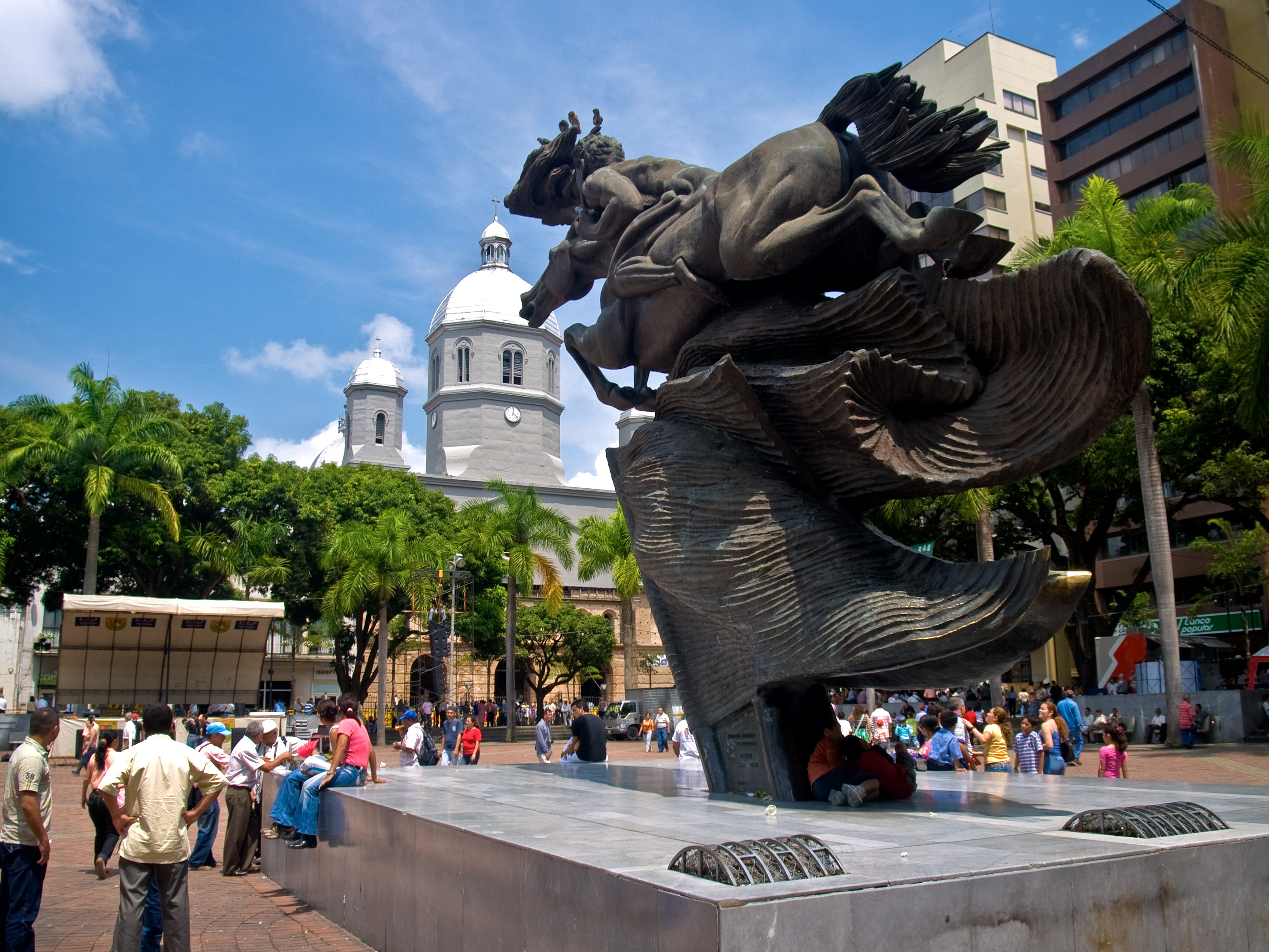 Plaza Bolivar Pereira con el Bolivar Desnudo y la Catedral Fotomisión # 33 - "URO" - Una nueva visión de la arquitectura de tu localidad